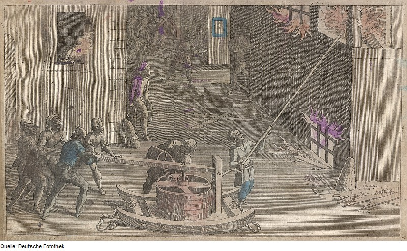 Original image description from the Deutsche Fotothek Physik & Mechanik & Brandschutz & Feuerlöschgerät